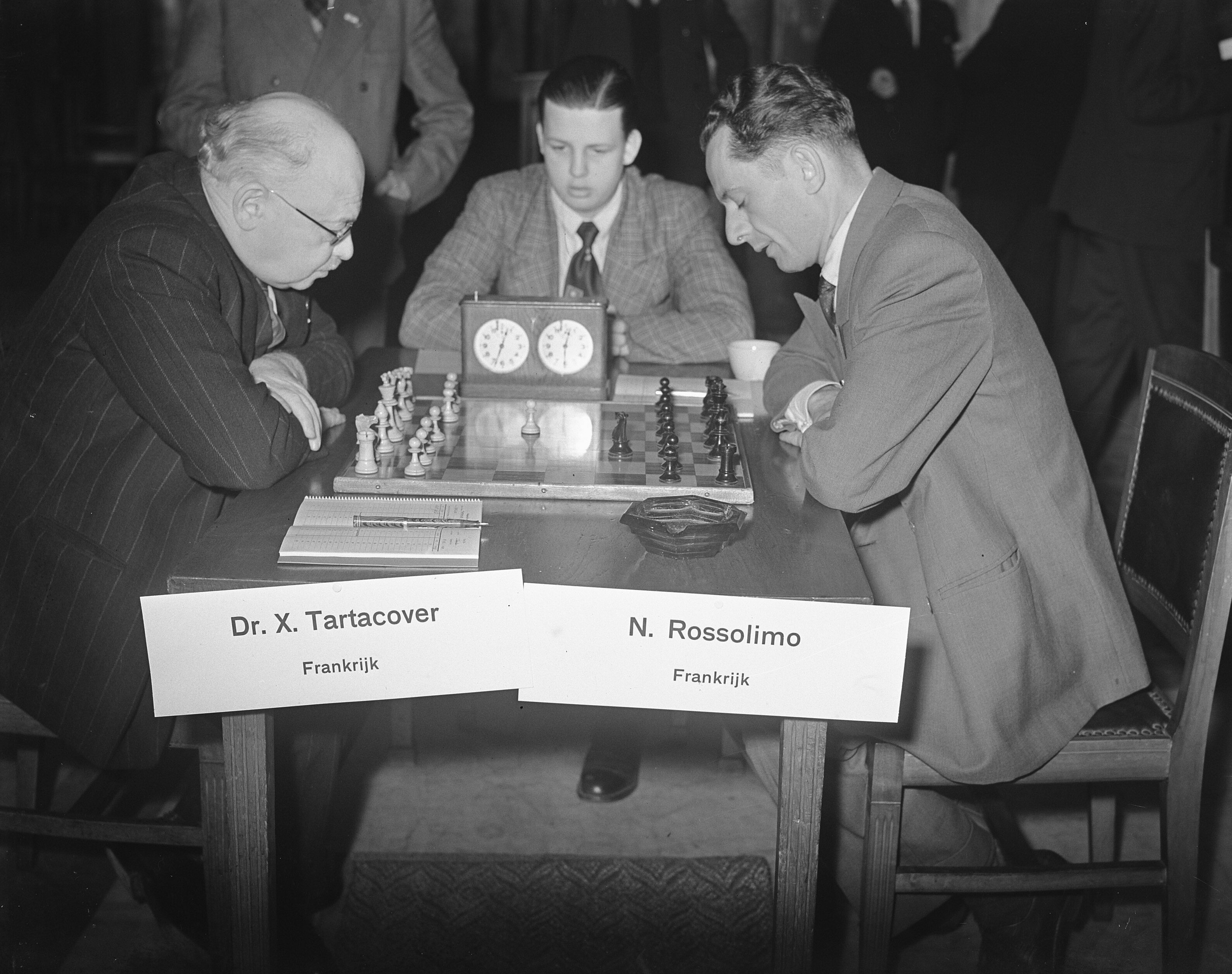 Collectie / Archief : Fotocollectie Anefo Reportage / Serie : [ onbekend ] Beschrijving : Wereldschaaktoernooi eerste dag; Tartacover tegen Rossolimo Datum : 11 november 1950 Locatie : Amsterdam, Noord-Holland Trefwoorden : schaken, sport Persoonsnaam : Rosolino, Tartakower Fotograaf : Pot, Harry / Anefo Auteursrechthebbende : Nationaal Archief Materiaalsoort : Glasnegatief Nummer archiefinventaris : bekijk toegang 2.24.01.09 Bestanddeelnummer : 904-2917